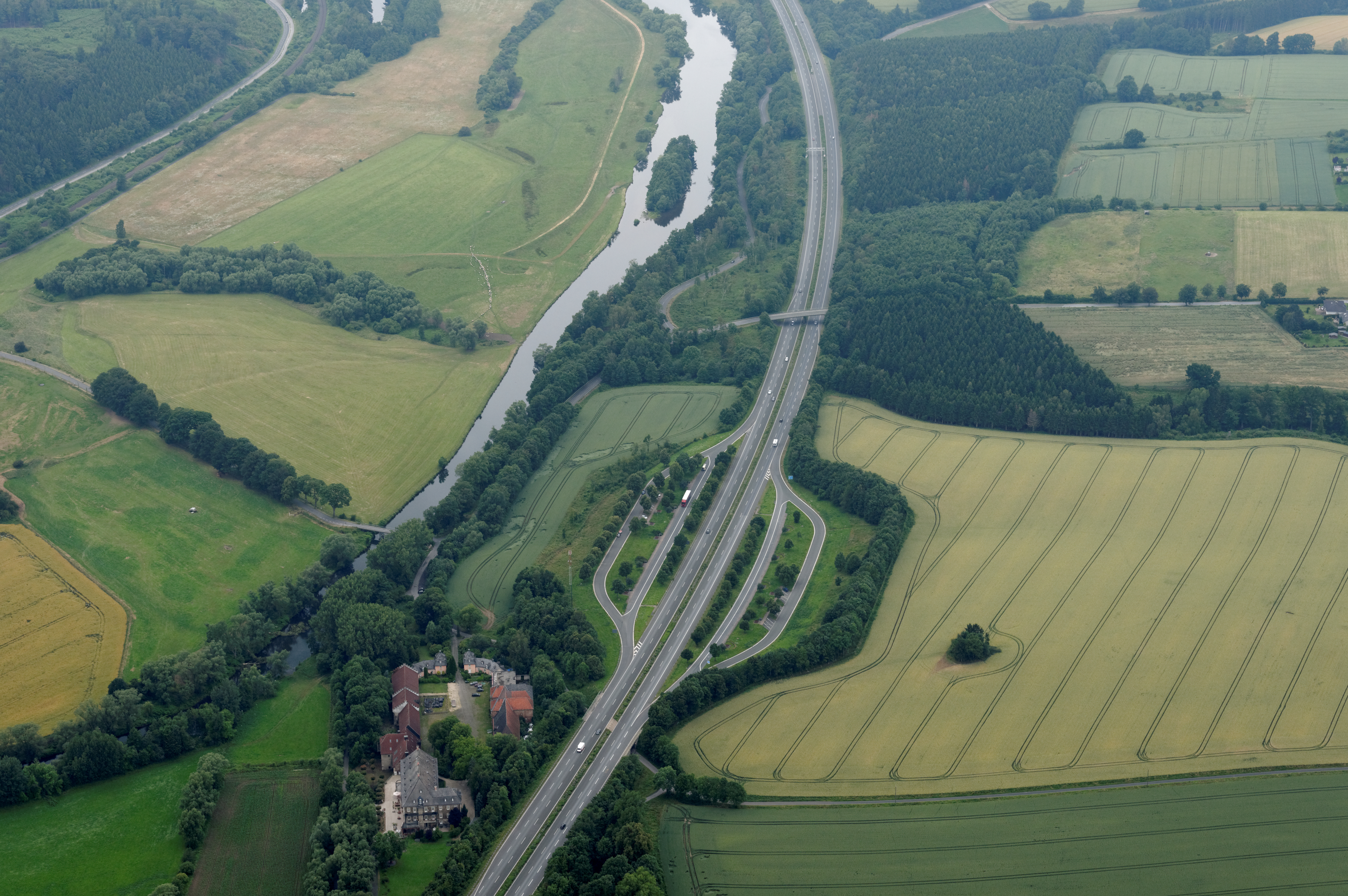 A 445 mit Parkplatz Ruhrtal/Haus Füchten, Haus Füchten, Ruhr im Naturschutzgebiet „Ruhraue“ (Fotoflug Sauerland Nord)